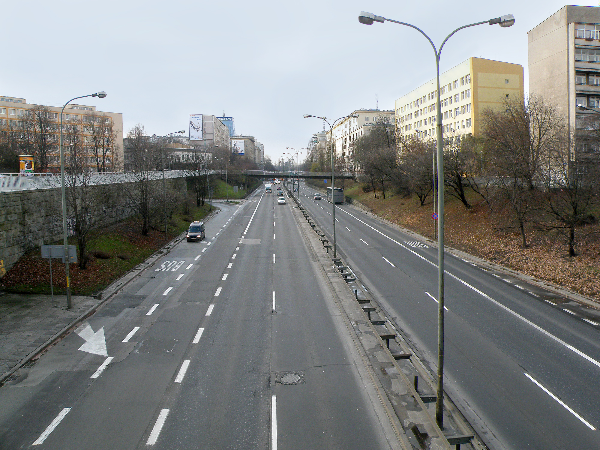 Warszawa, Aleja Armii Ludowej